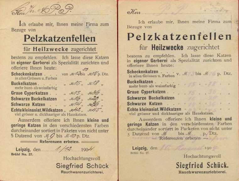 2 Werbekarten aus dem Jahr 1912 mit Katzenfellpreisen. Rauchwarenzurichterei Siegfried Schück, Leipzig, Brühl No. 27. Ich erlaube mir, Ihnen meine Firma zum Bezuge von Pelzkatzenfellen für Heilzwecke zugerichtet bestens zu empfehlen. Angebote von Scheckenkatzen, Buckelkatzen, Cyperkatzen, echte kleinasiatische Wildkatzen u. anderes. Anmerkung: Der Begriff „Buckelkatzen“ im Zusammenhang mit Fellen scheint in der Pelz-Fachliteratur nicht erklärt. Eventuell bezieht er sich, übertragen, auf das englische „buck“ (Bock), Katzenfelle sind teilweise sehr kräftig im Leder, diese werden im Handel als „buckskins“ oder „bucks“, im deutschen Handel als „bockig“, bezeichnet.